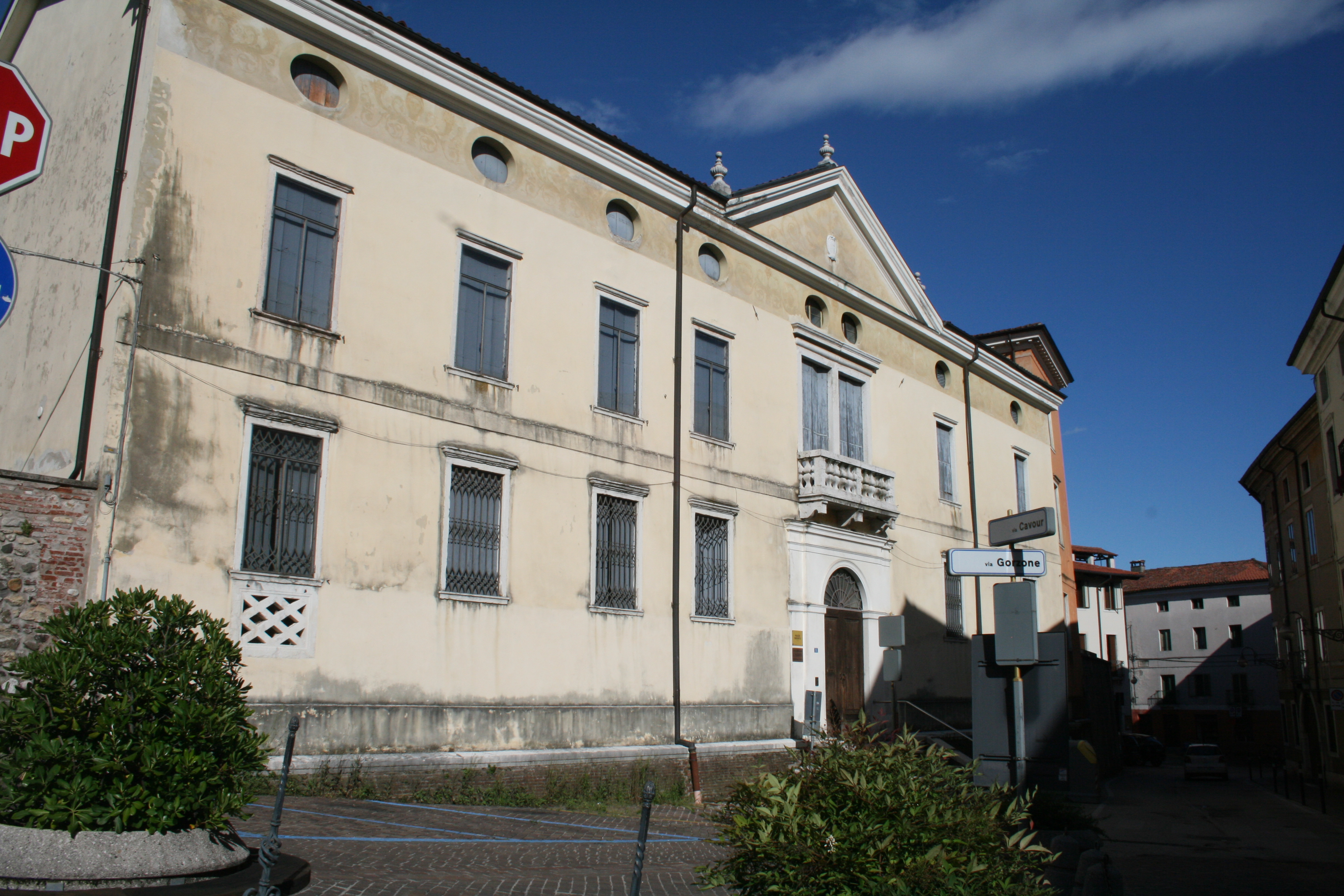 Palazzo Boschetti